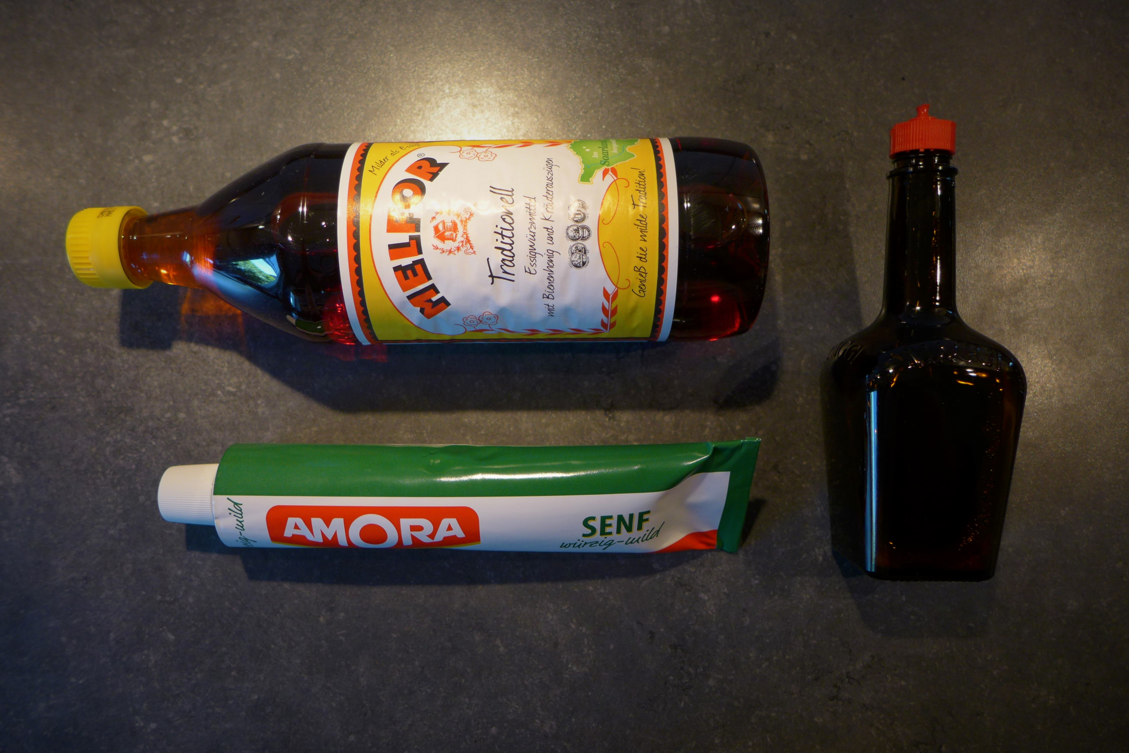 Typische saarländische Speisewürzen (Bienenhonigessig, Senf, Flüssigwürze)